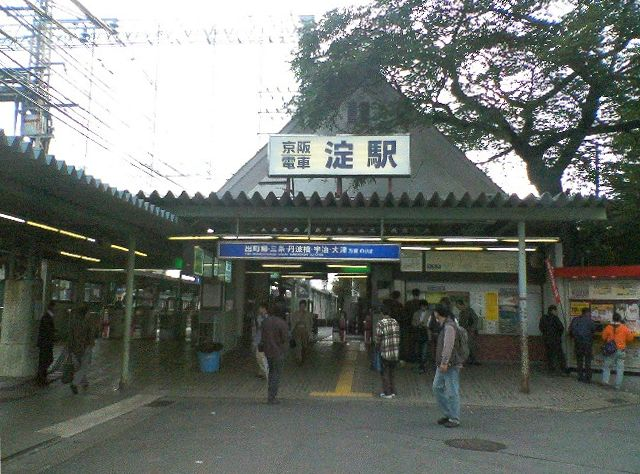 京阪本線淀駅（出町柳方面改札口、2005年10月23日撮影）